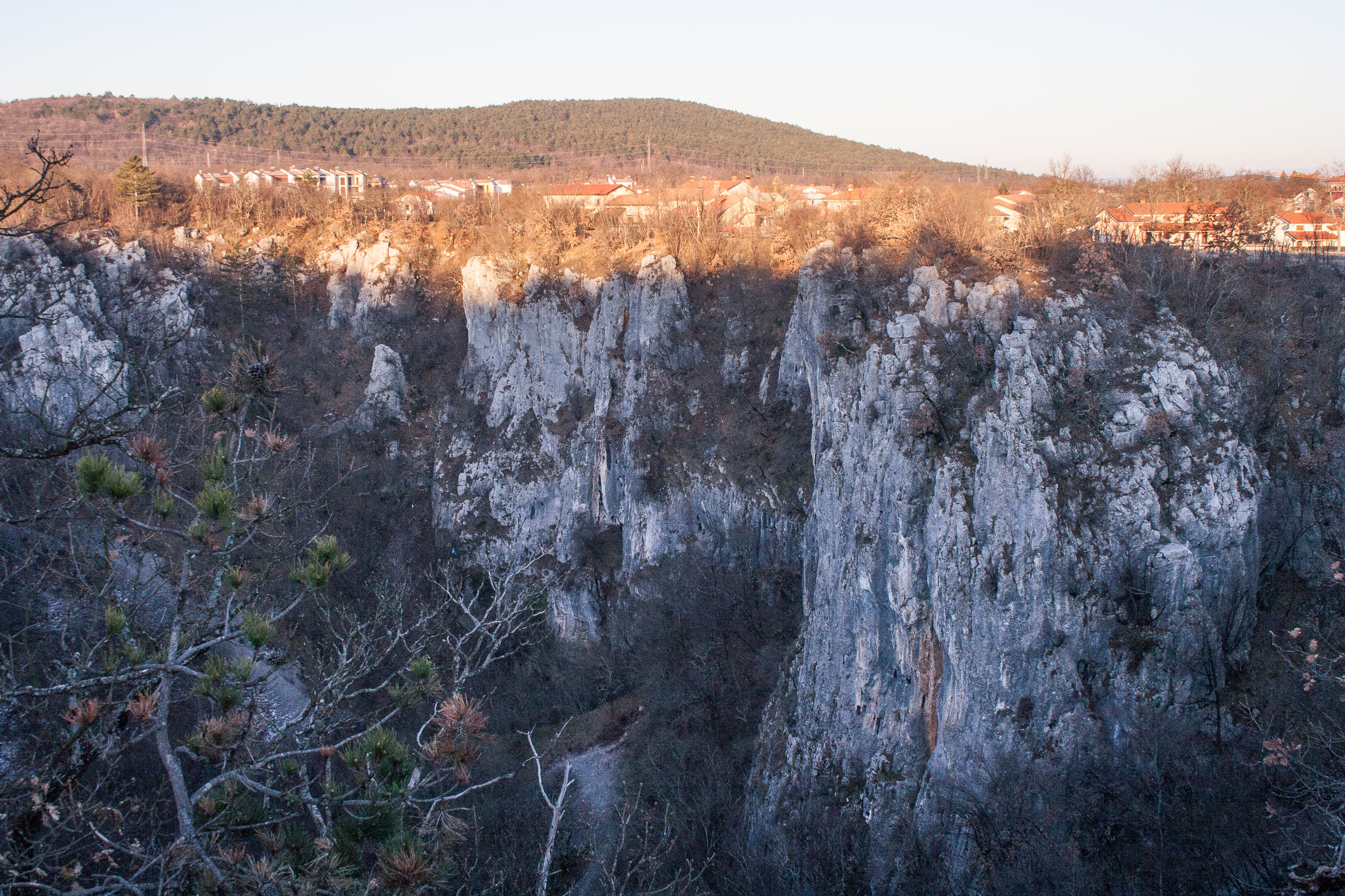 Le pareti a strapiombo della Dolina Risnik